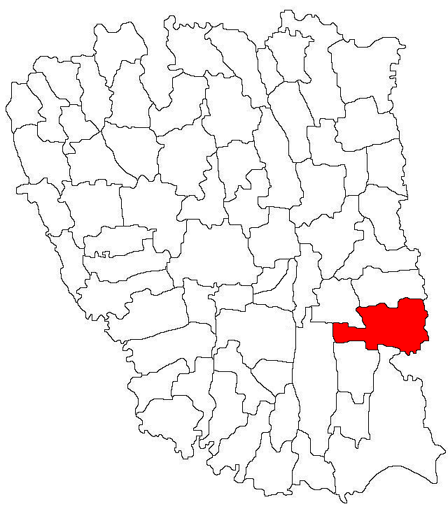 Categorie:Hărţi ale judeţului Galaţi